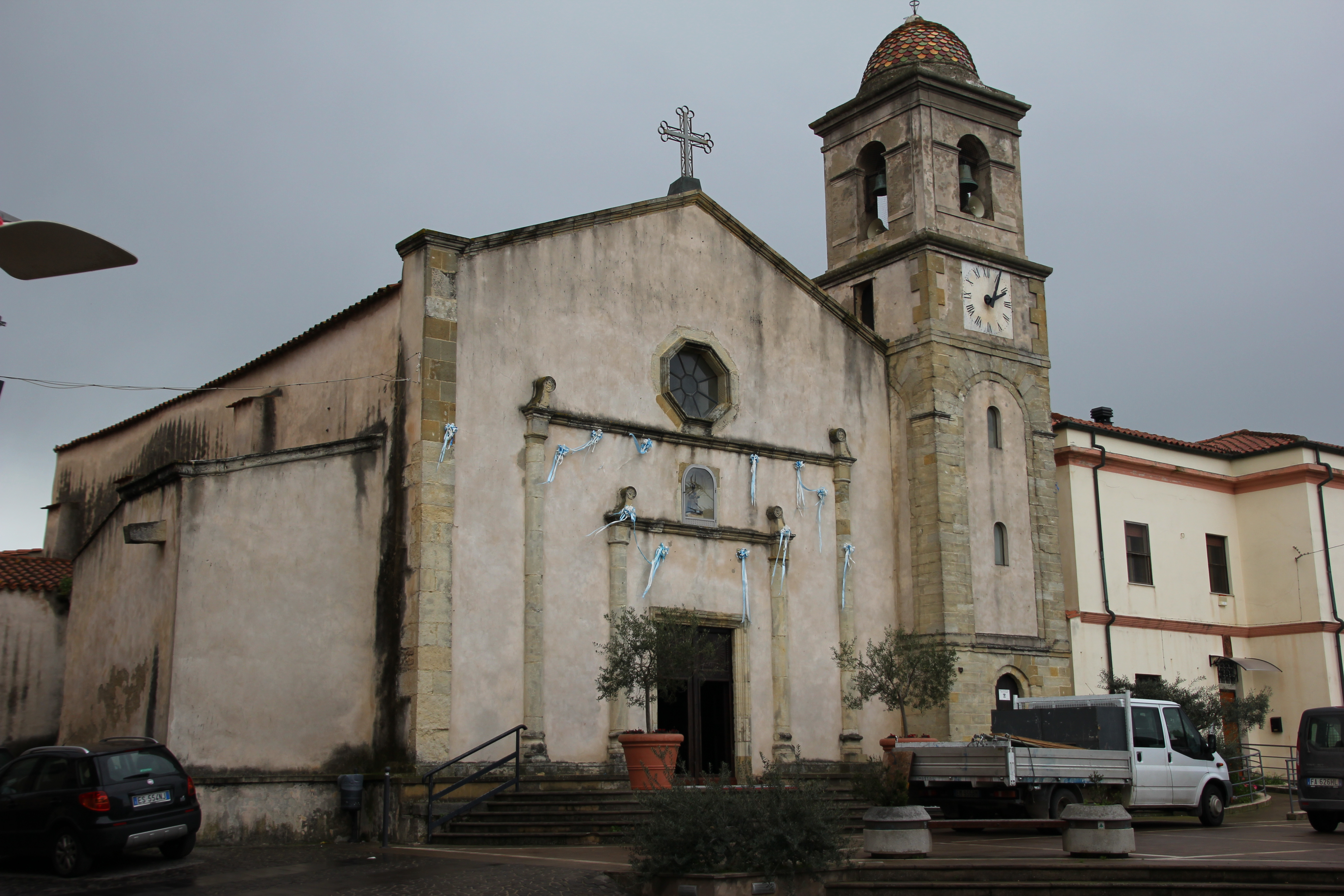 Marrubiu - Chiesa di Nostra Signora di Monserrato